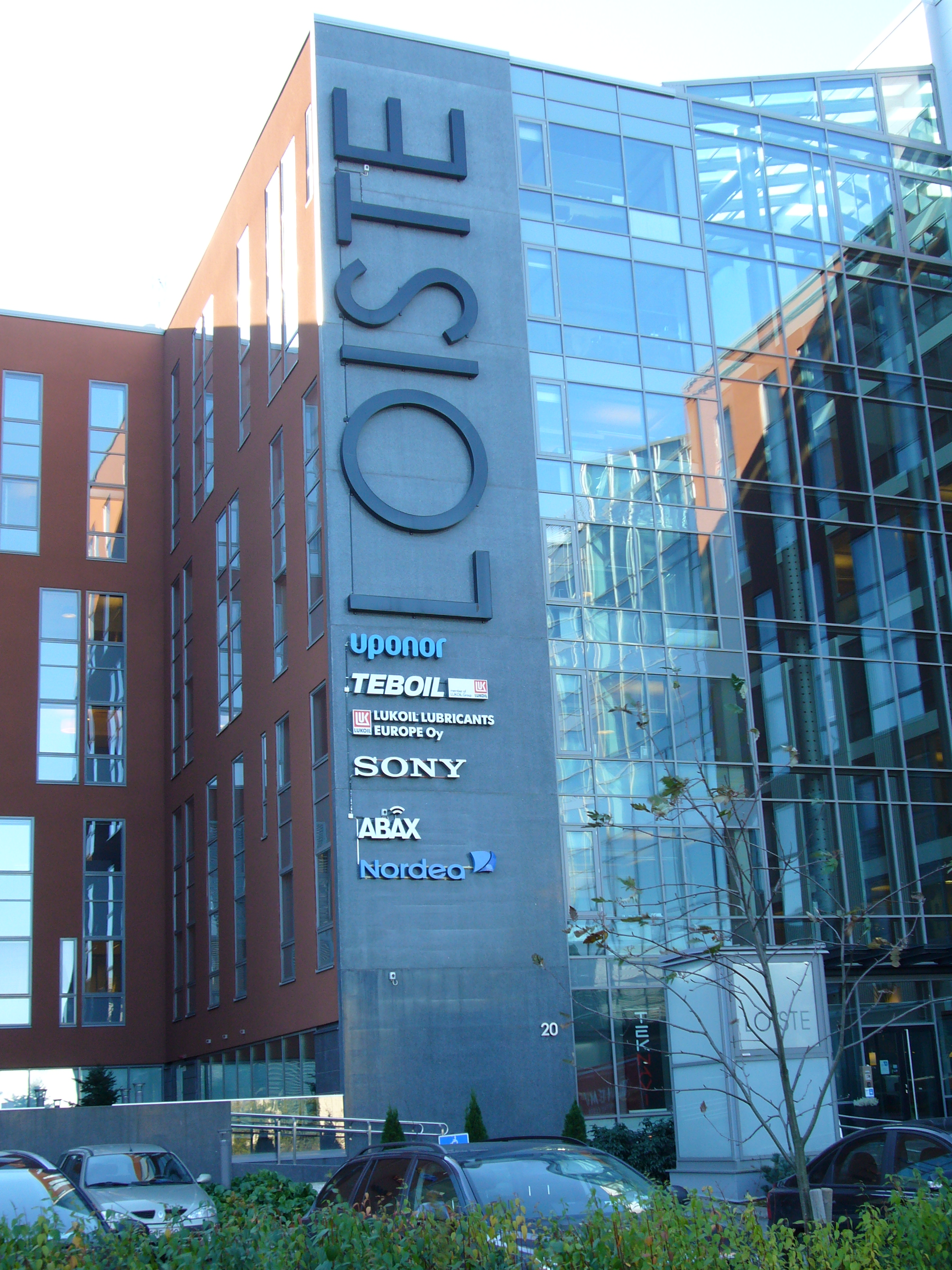 Uponorin pääkonttori